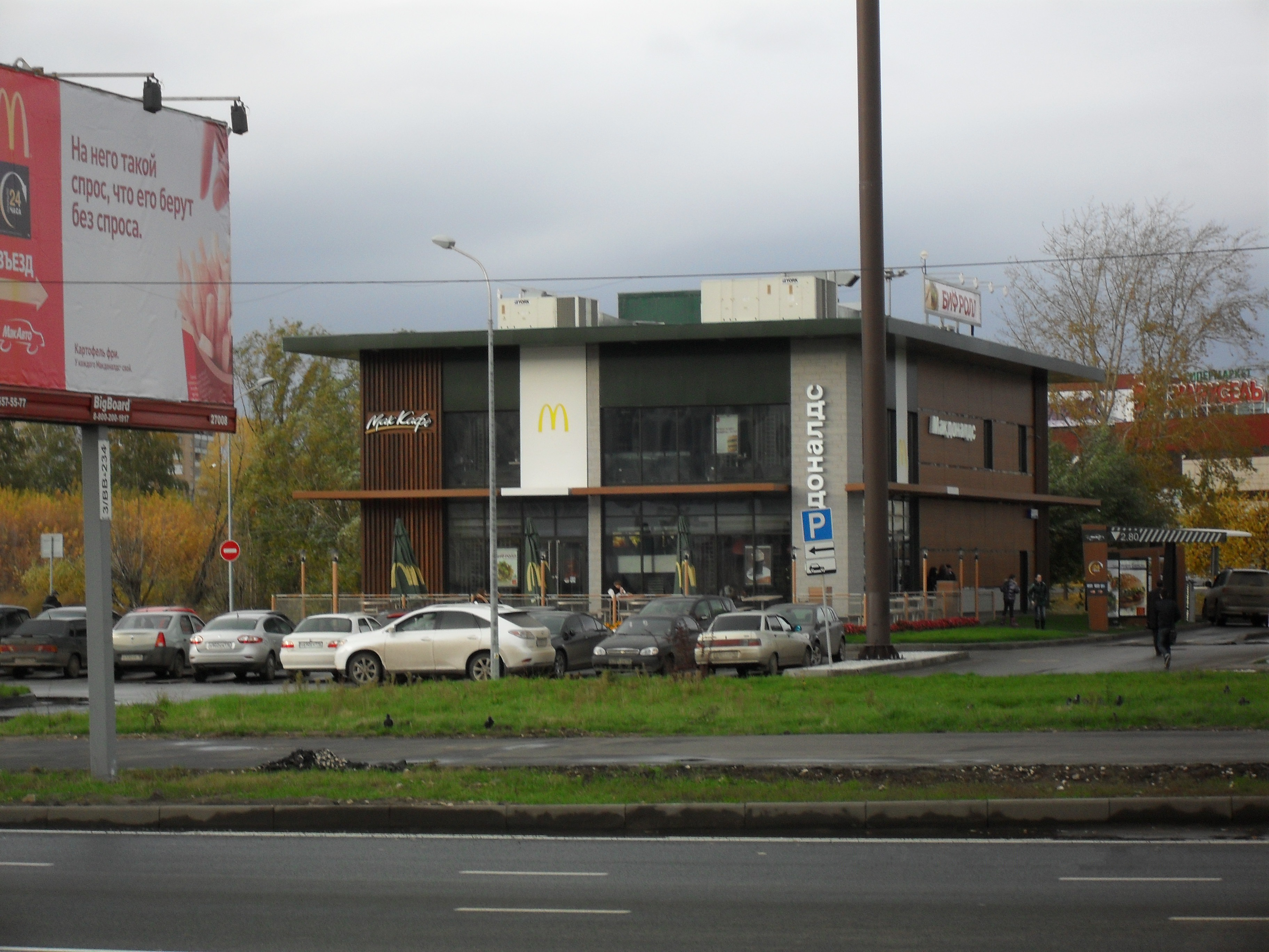 Макдональдс на улице Вахитова (Казань)